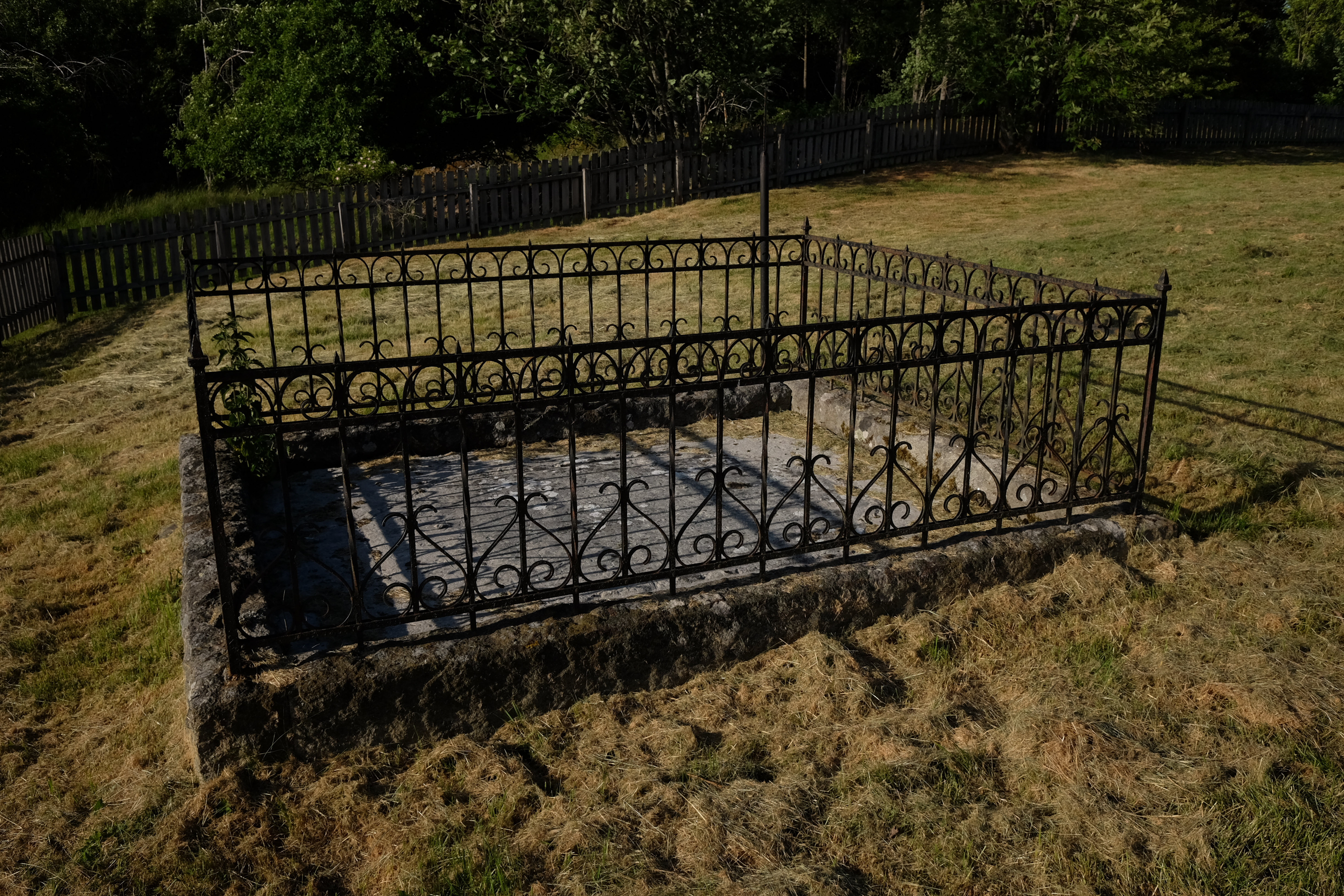 Lämningarna efter Vassända kyrka, Vänersborg. Gravsten efter lantmätaren Wilhelm Kruse (1674–1739) och hans hustru Christina Beata Labechia.